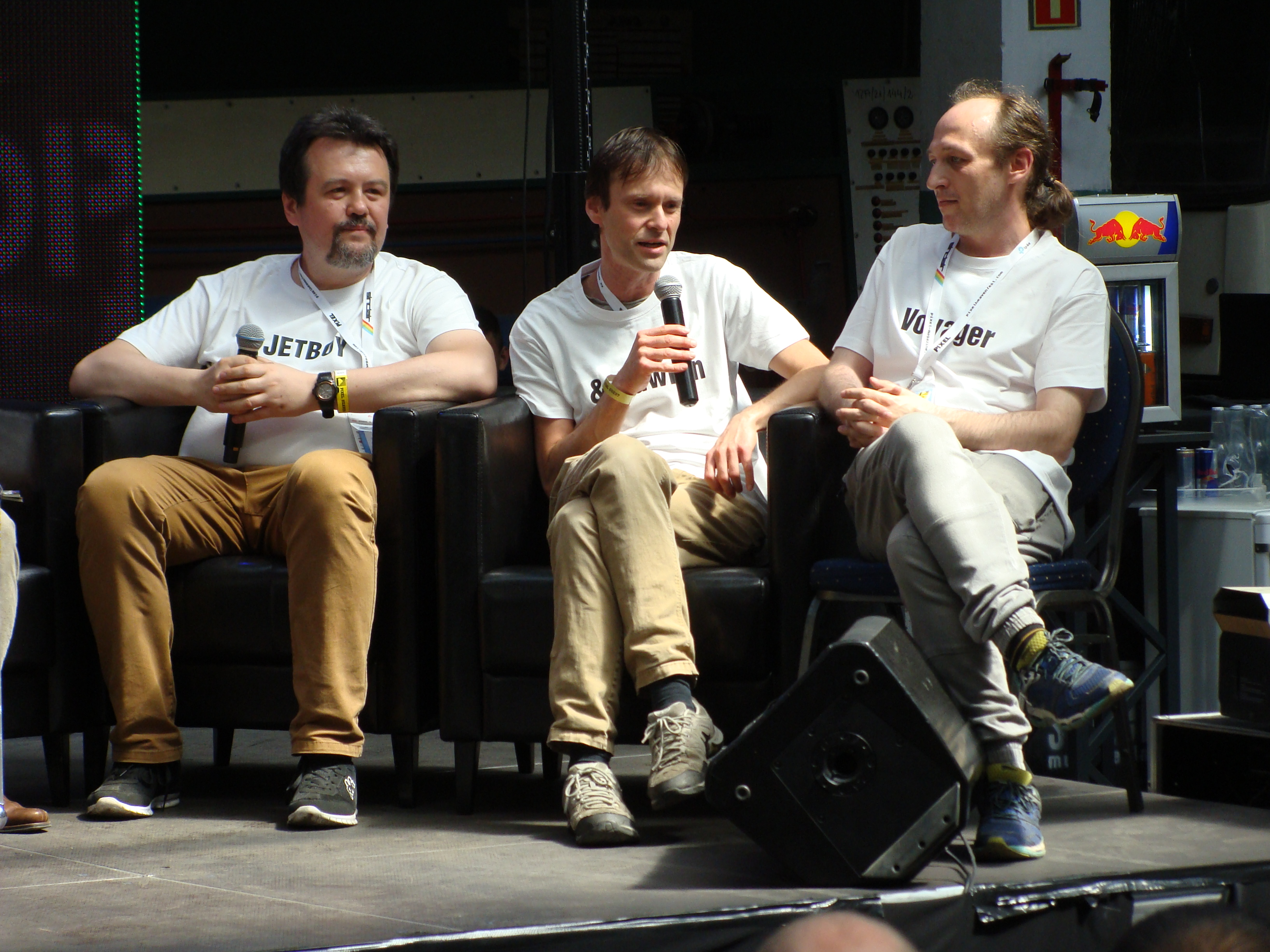 Piotr Gawrysiak podczas spotkania członków redakcji "Top Secret" na festiwalu "Pixel Heaven", 27 maja 2017, Warszawa.